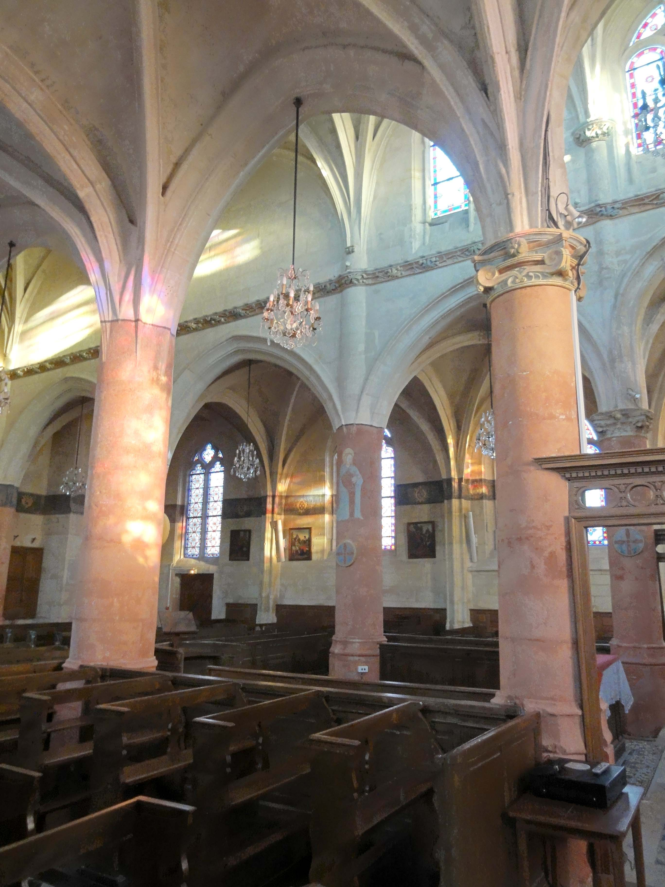 Intérieur de l'église - voir titre.